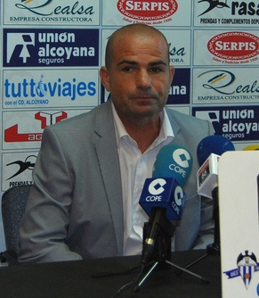 Francisco López Fernández, Paco López, en el dia en que va ser destituït com entrenador del CD Alcoyano.